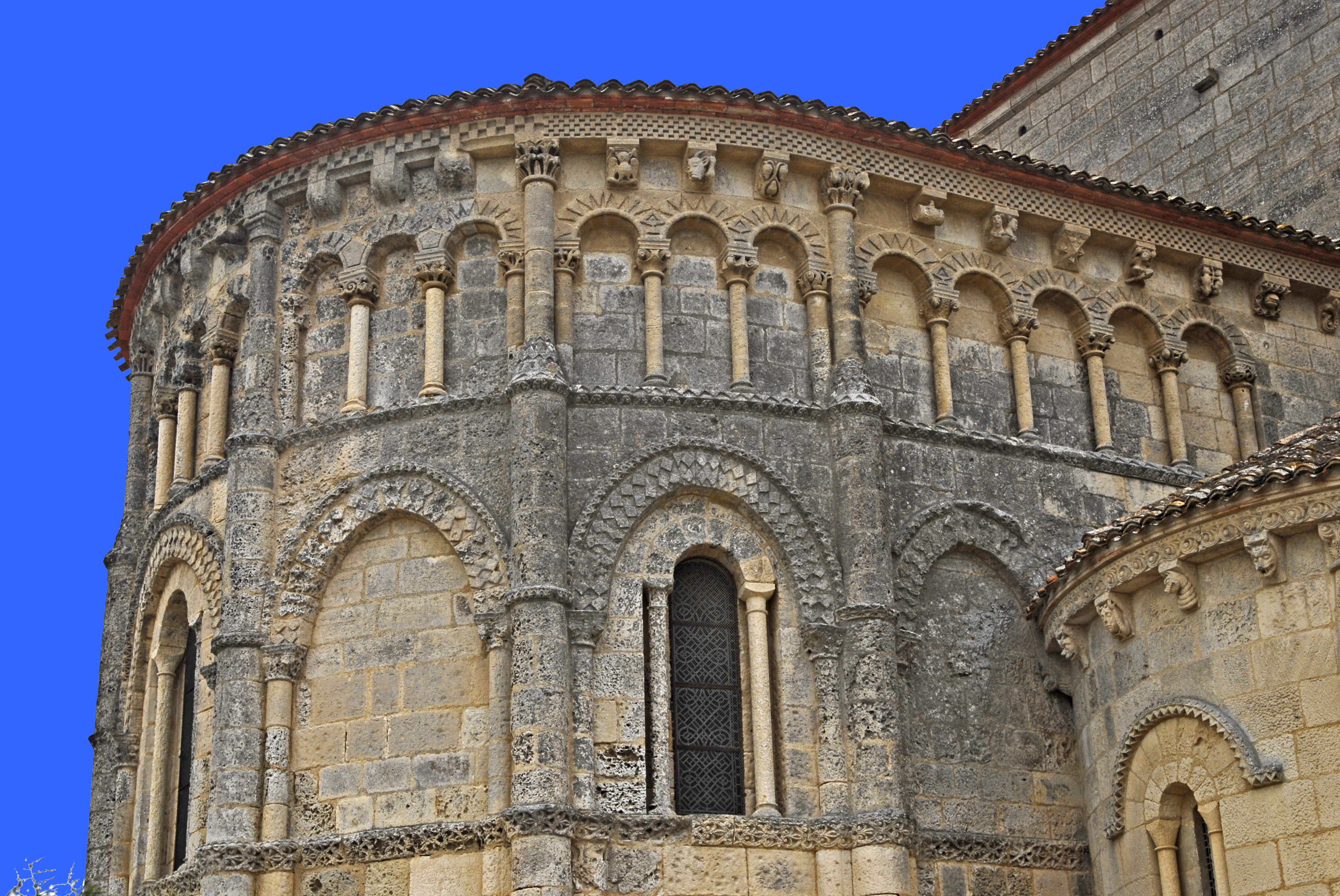 Sainte-Radegonde-Talmont-sur-Gironde,Chorhaupt seitlich